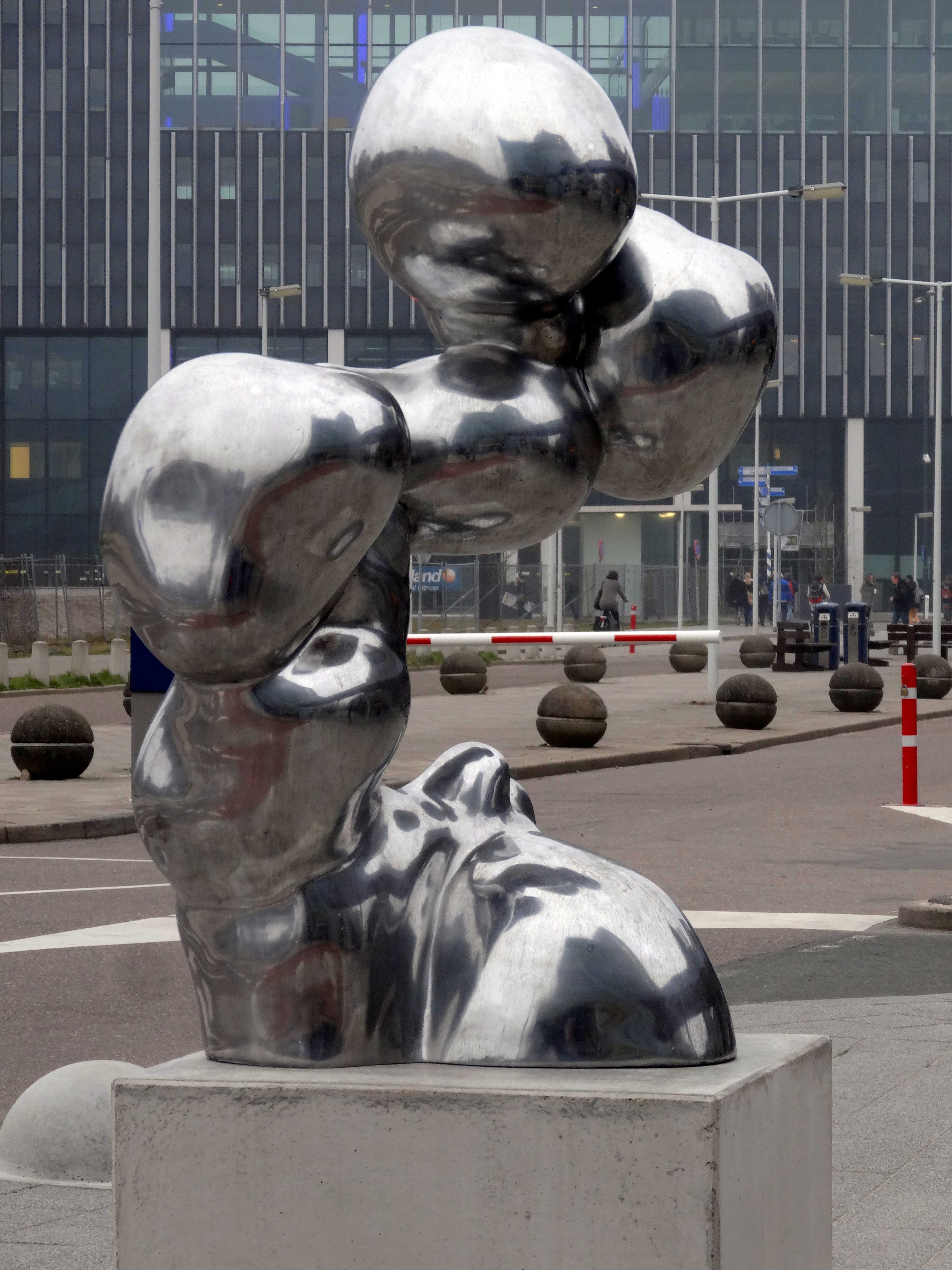 "Liquid Light XL" door Adam Colton nabij het LUMC in Leiden